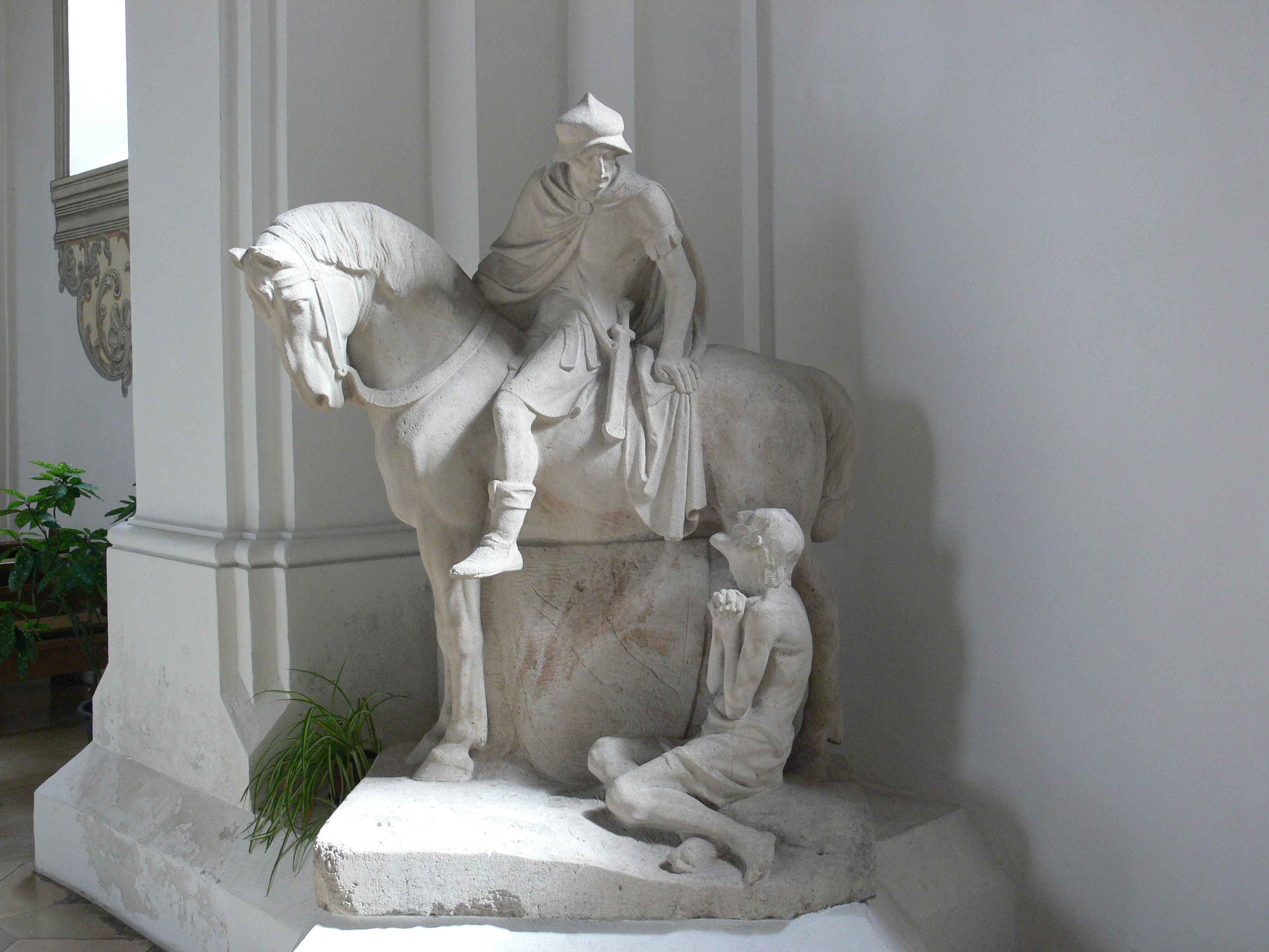 Stadtpfarrkirche St. Martin, Biberach an der Riß Vorhalle, Skulptur "St. Martin und der Bettler"